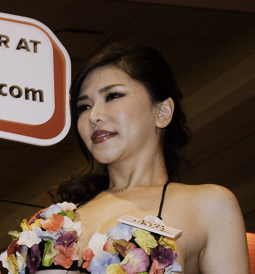 AEE16_0449bas